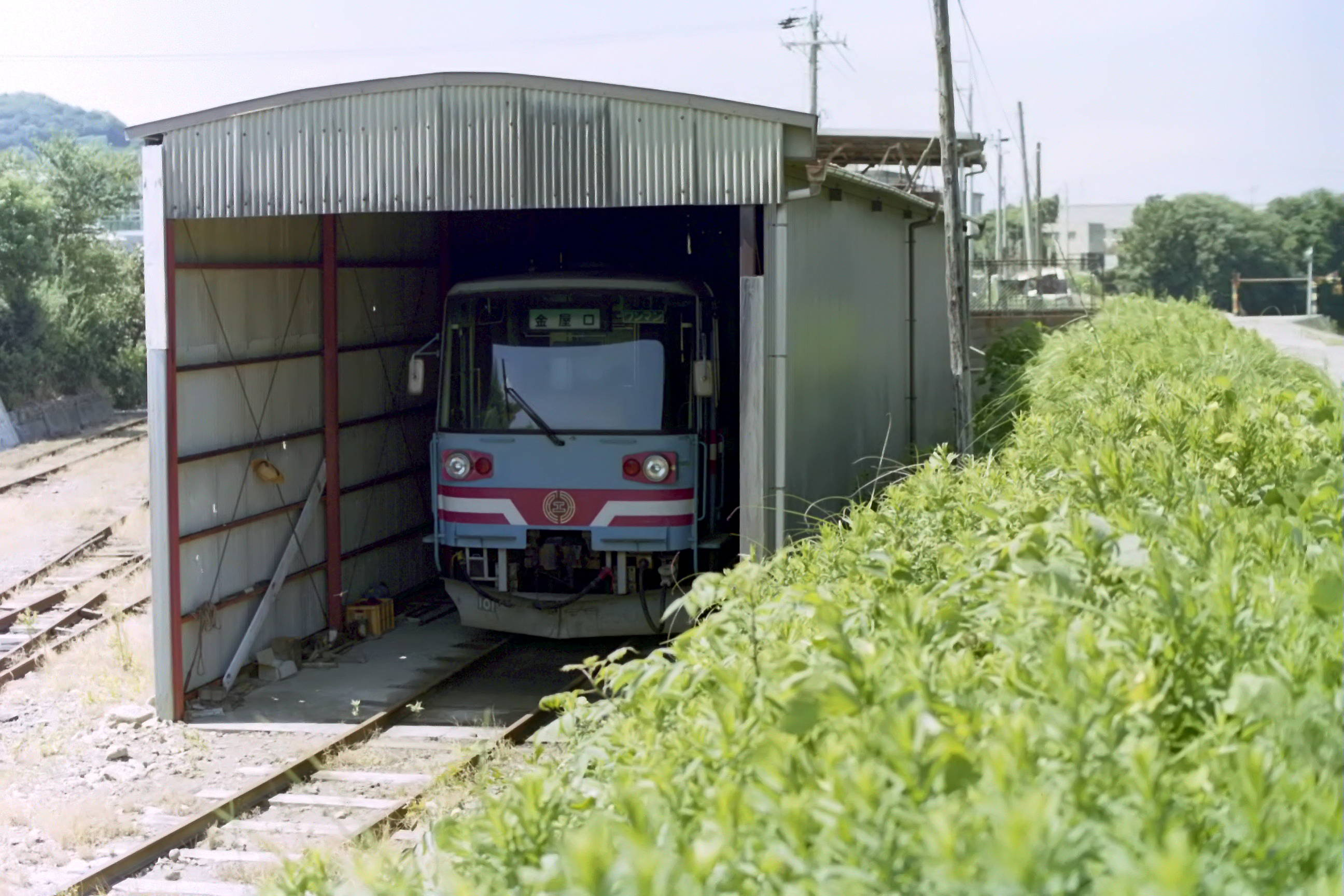 有田鉄道に譲渡直後の樽見鉄道ハイモ180-100形 整備中で、未だ車体は樽見鉄道カラーのまま